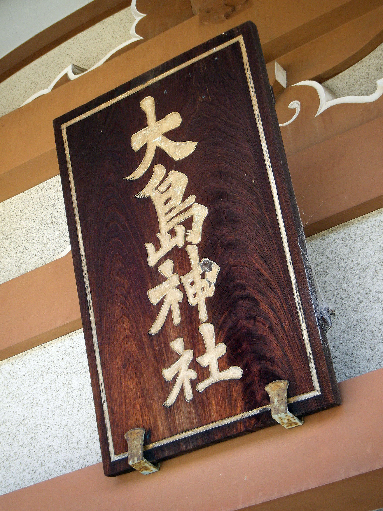 尼崎・大島神社 社殿額面